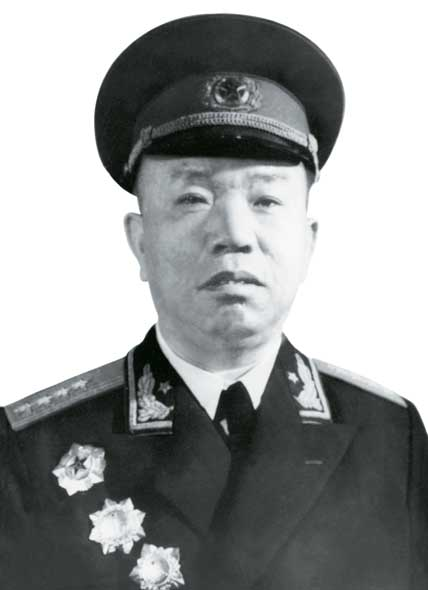 王树声授勋照